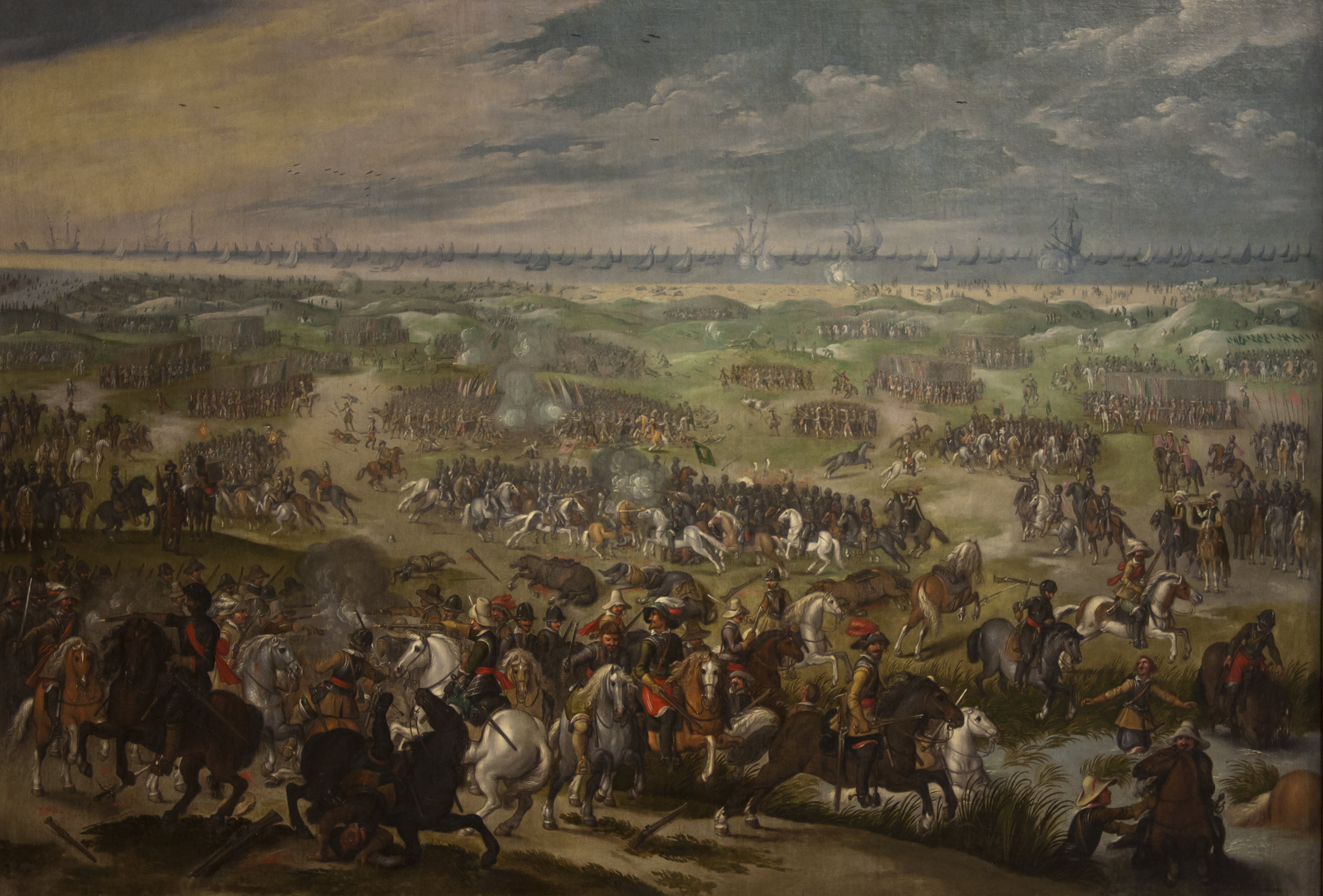 Batalla de las Dunas en Newport que tuvo lugar el día 2 de junio de 1600.